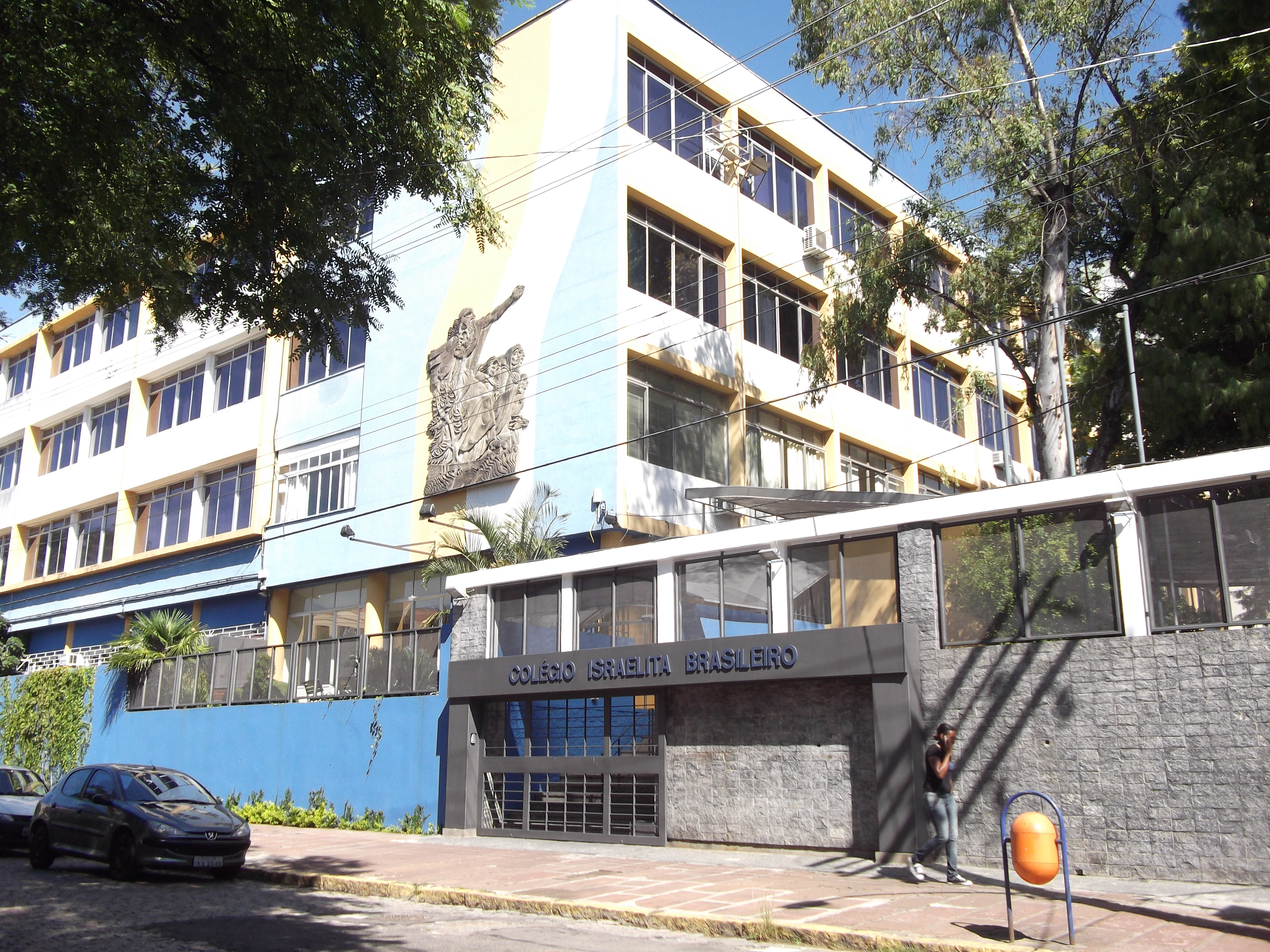 Colegio Israelita, Av Protasio Alves n 943, Porto Alegre, Brasil